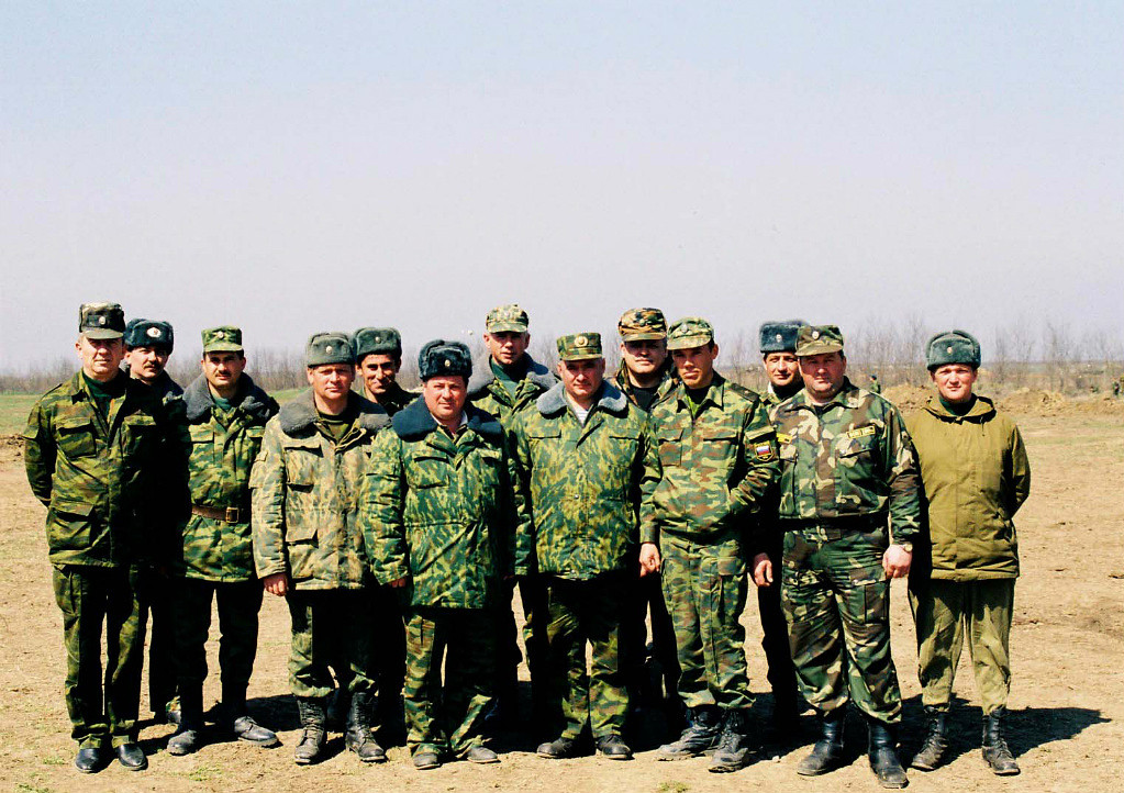 Управление 58 армии в поле, 2003 год